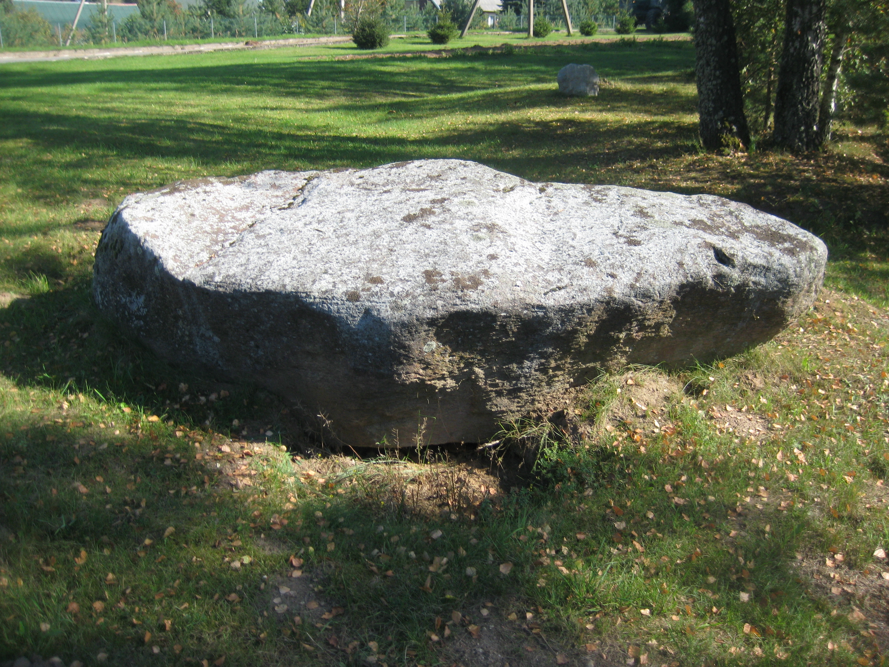 Sudeikiai, Lithuania